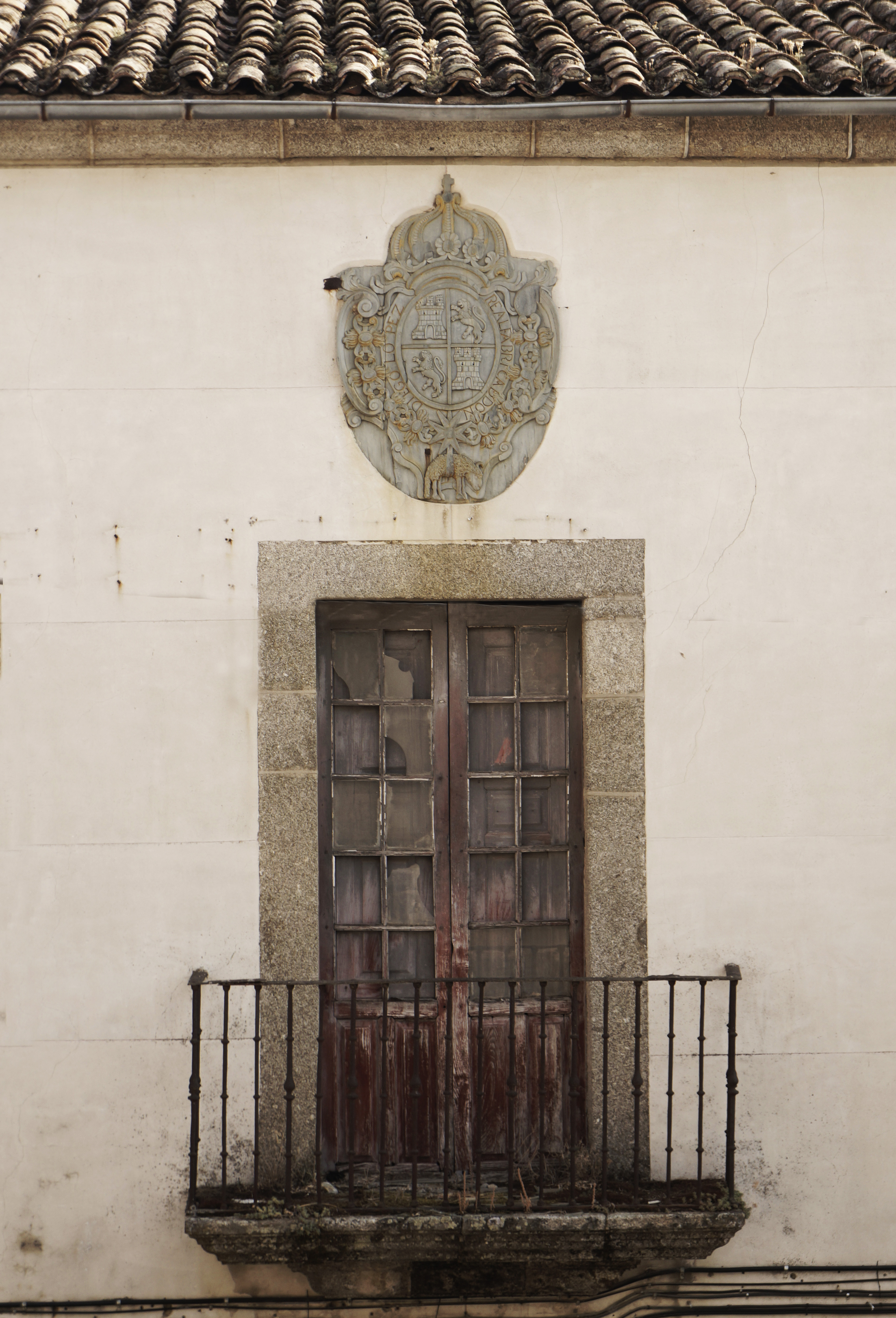 Escudo sobre el balcón de la fachada de la Real Fábrica de Diego López